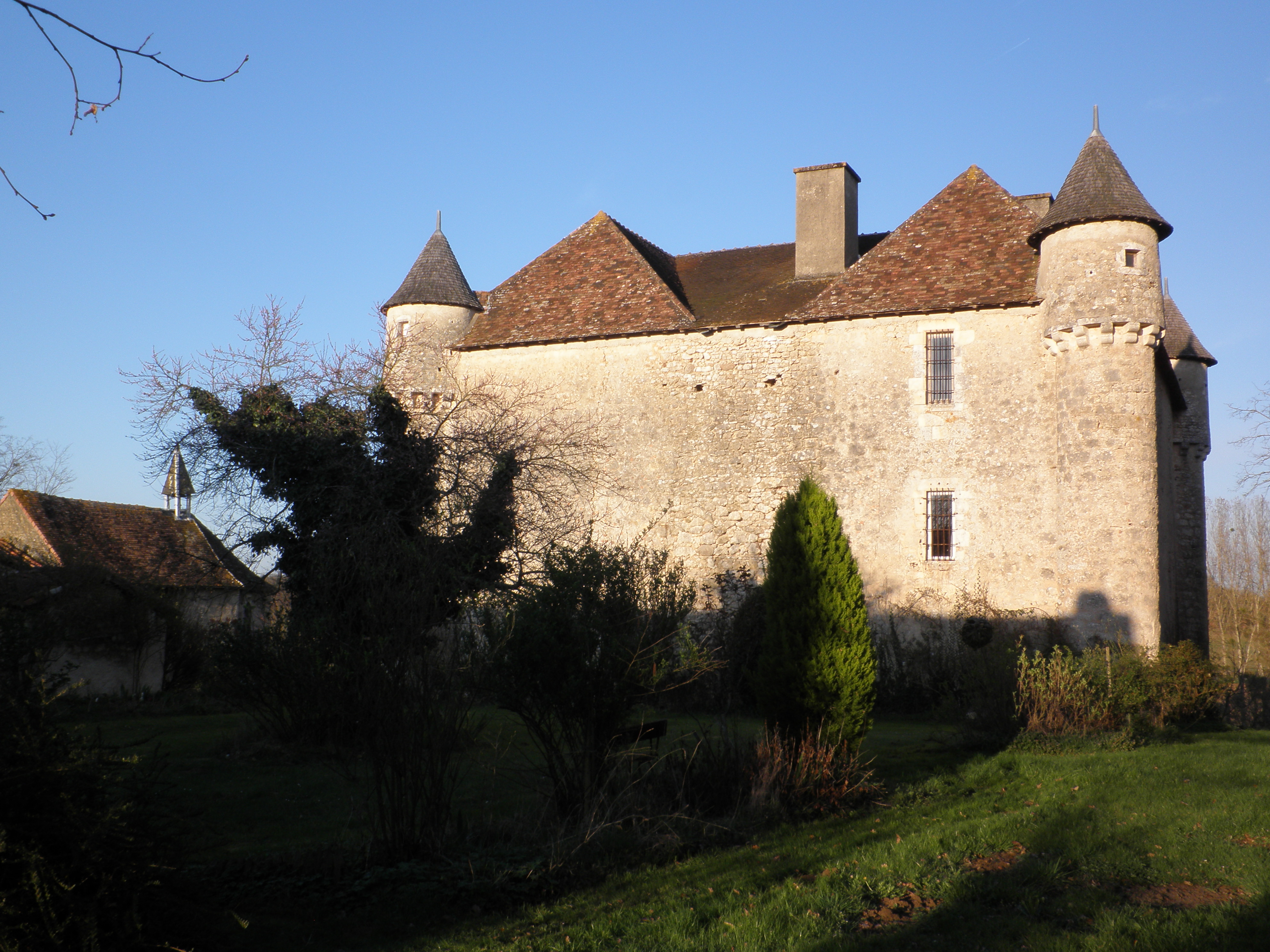 Le château de Pruniers (86) en mars 2011